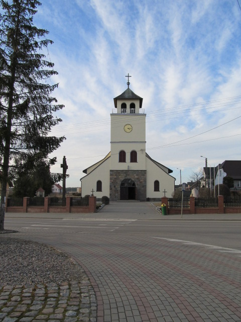 Kościół Najświętszego Serca Pana Jezusa w Lini